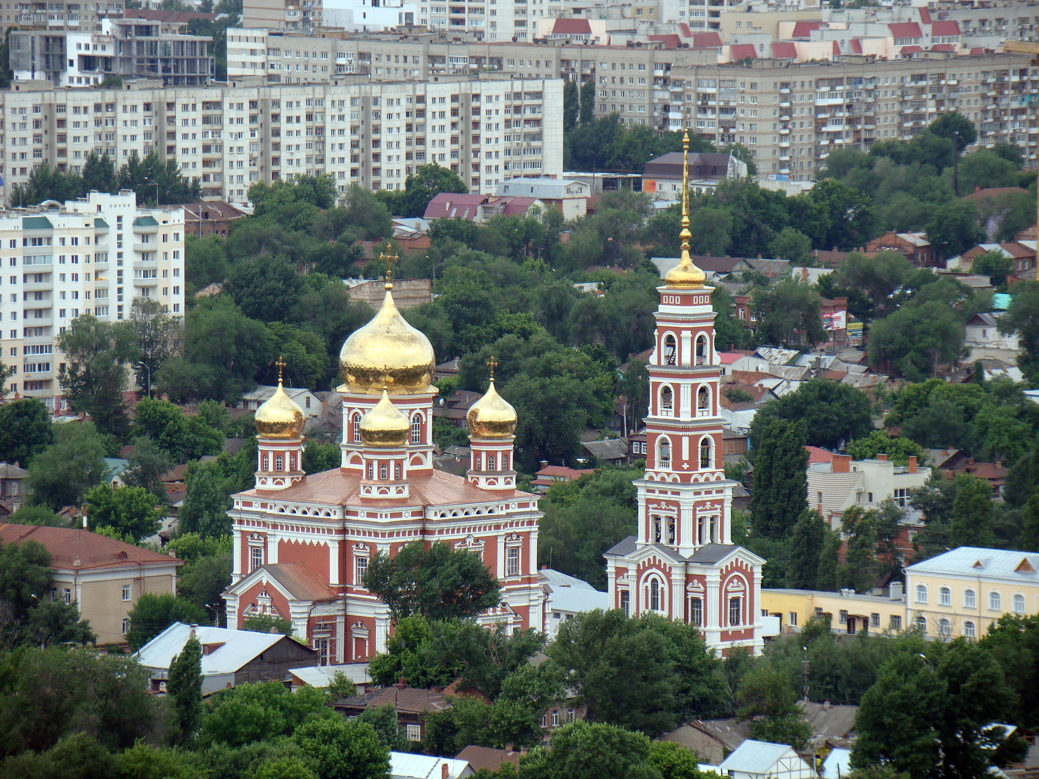 Саратов. Покровский собор.